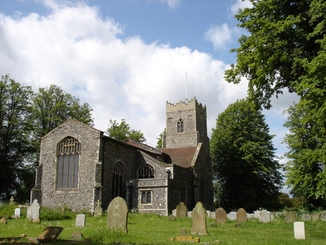 St. Peter's, Copdock